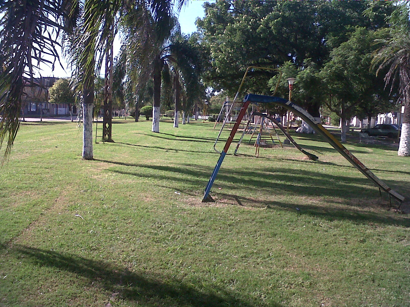 Paseo de las Provincias